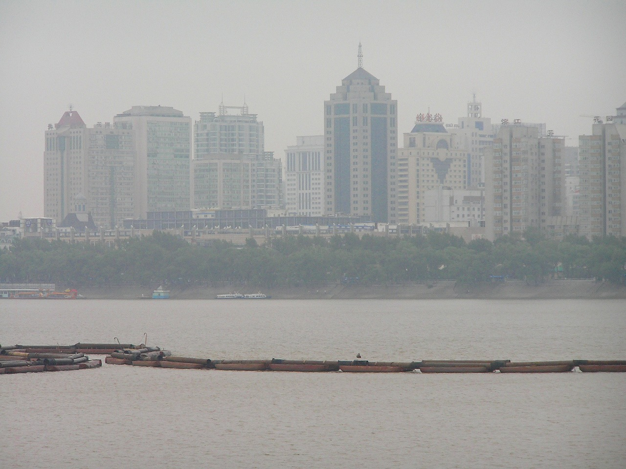 ハルピンの街は、松花江によって南北に分断されているが、街の主要部分は川の南側にある。 1964年、太陽島景勝地が正式に創設され、1989年黒龍江省の名勝に認定され、2002年には中国の国家観光局に4A級の観光地に評定、さらに2007年5月には5A級の観光地に昇格された。